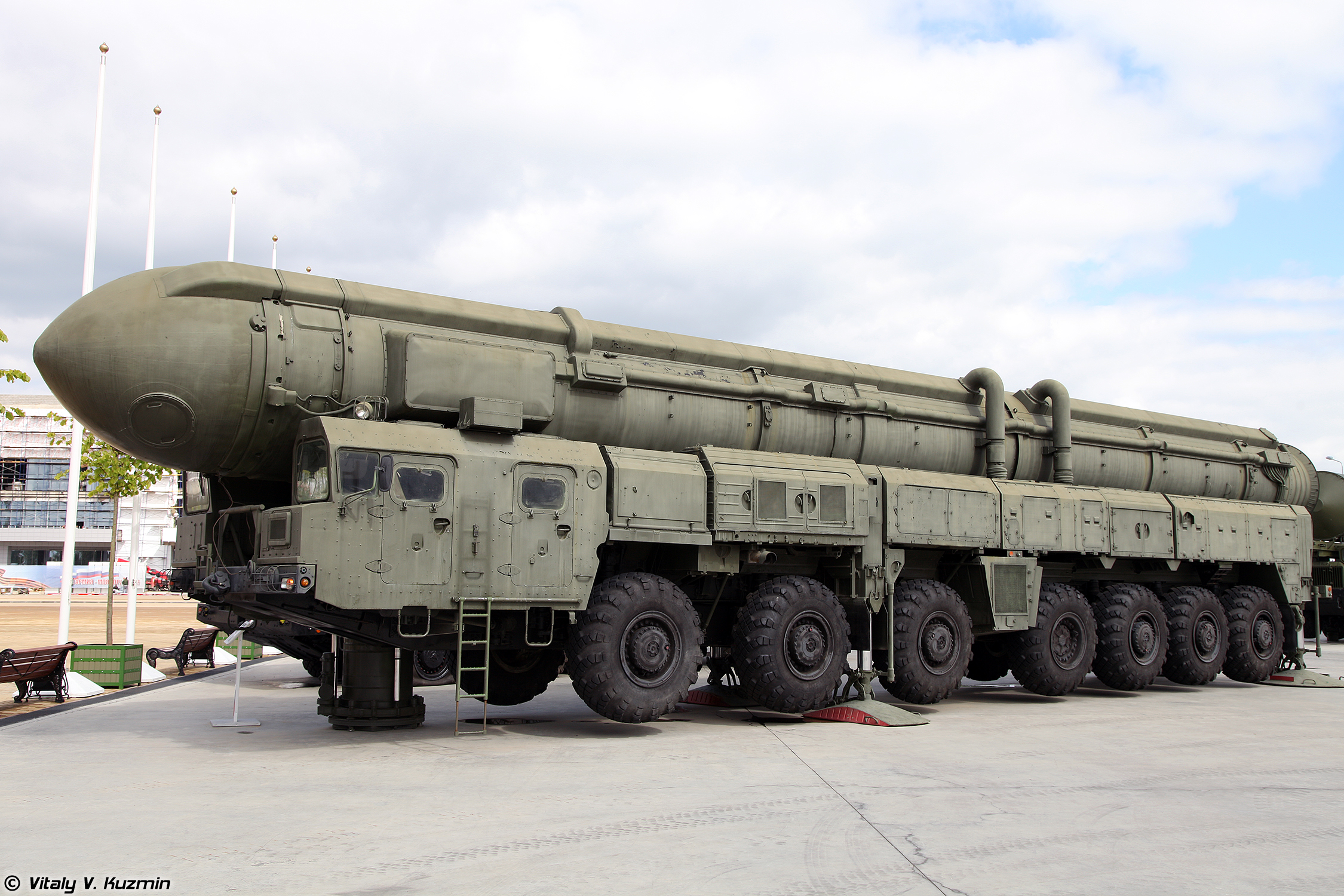 Автономная пусковая установка 15У168 ракетного комплекса 15П158 Тополь (15U168 TEL 15P158 Topol ICBM)